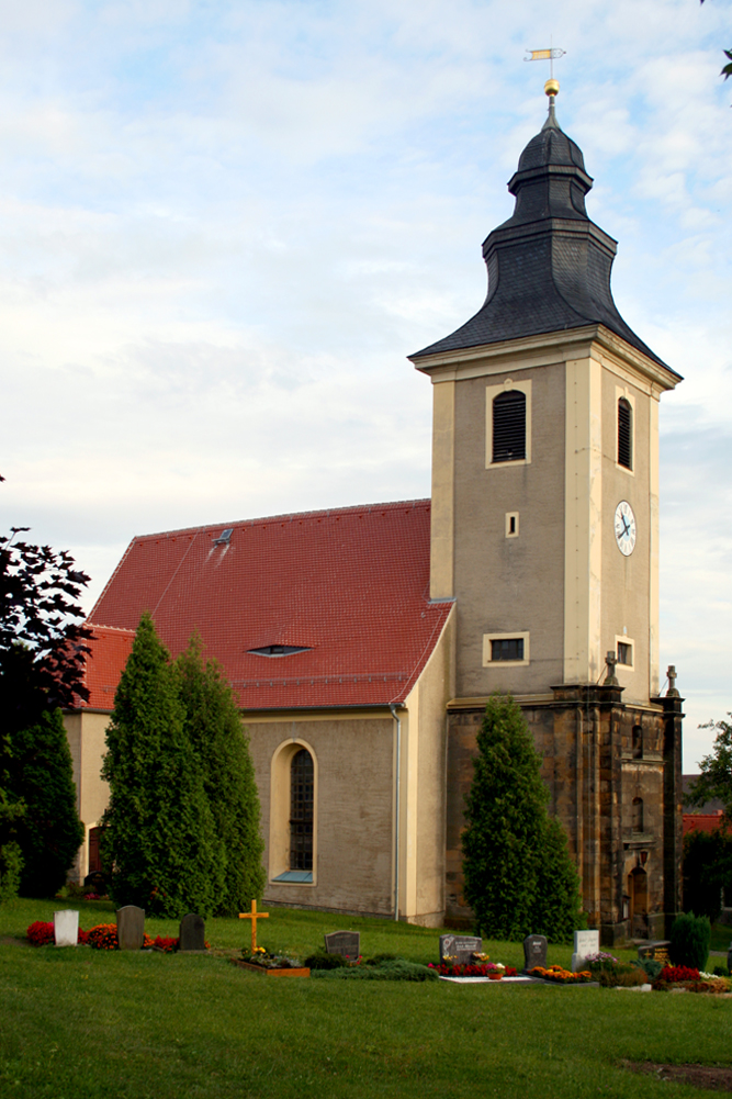 Die Kirche im Radeberger Ortsteil Großerkmannsdorf.